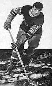 Aurel_Joliat.jpg